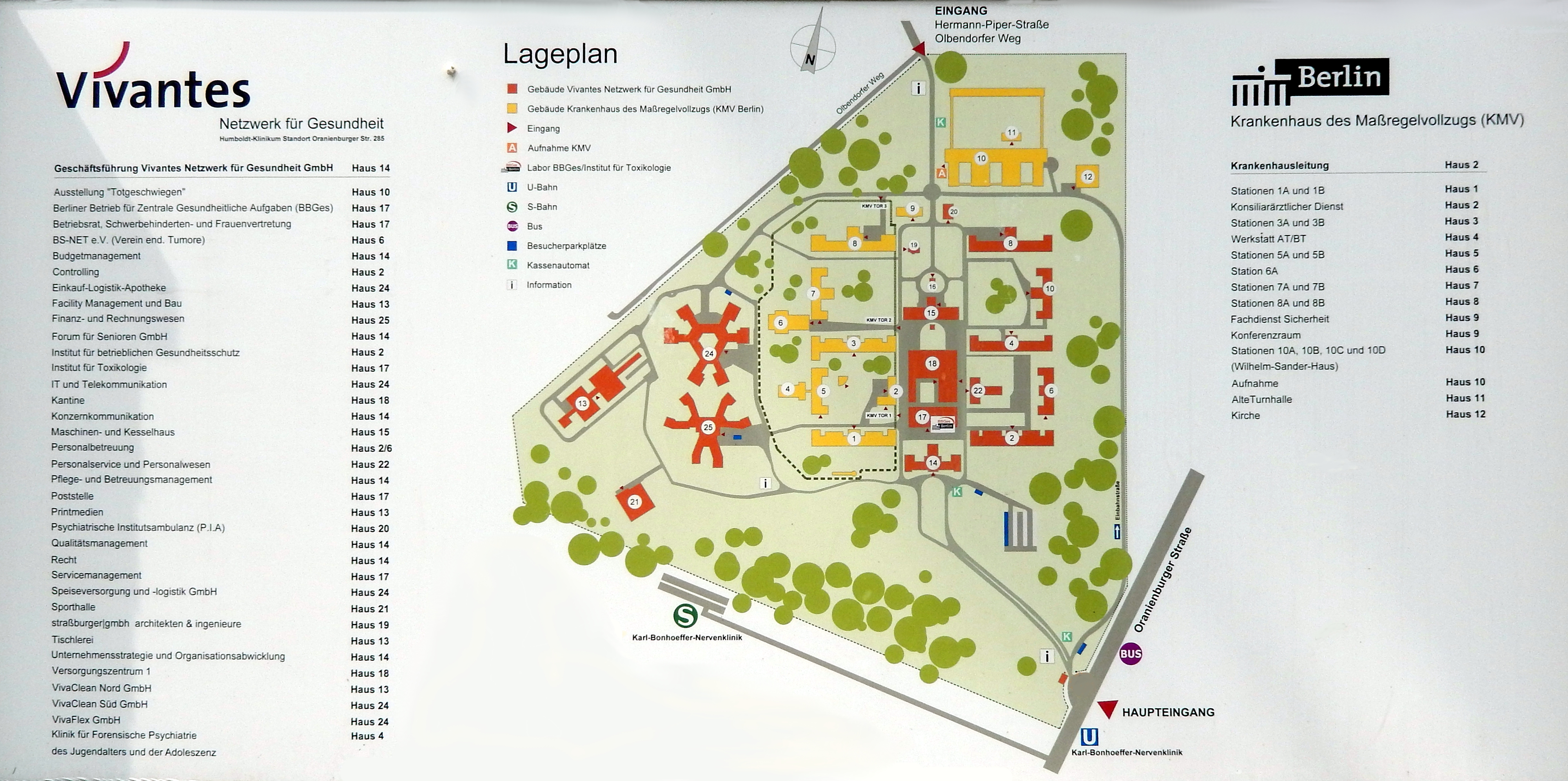 Lageplan Klinikstandort Berlin-Reinickendorf Oranienburger Straße